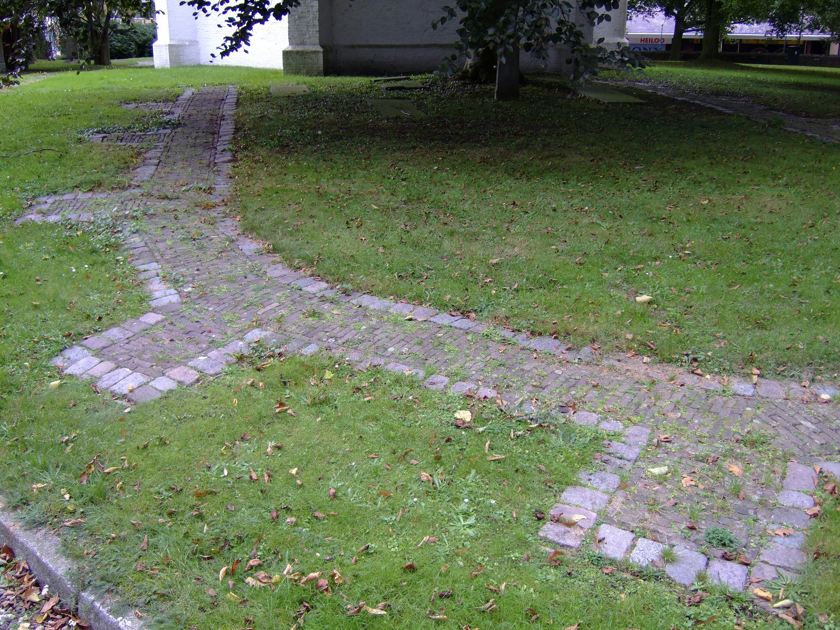 Witte Kerk: Middeleeuwse kerkheuvel, met stenen gemarkeerde ligging van verdwenen Middeleeuwse kerk Archeoregio 11, AMK-terrein 19A-008 (opmerking: Publicatie Uit Balans 2006)